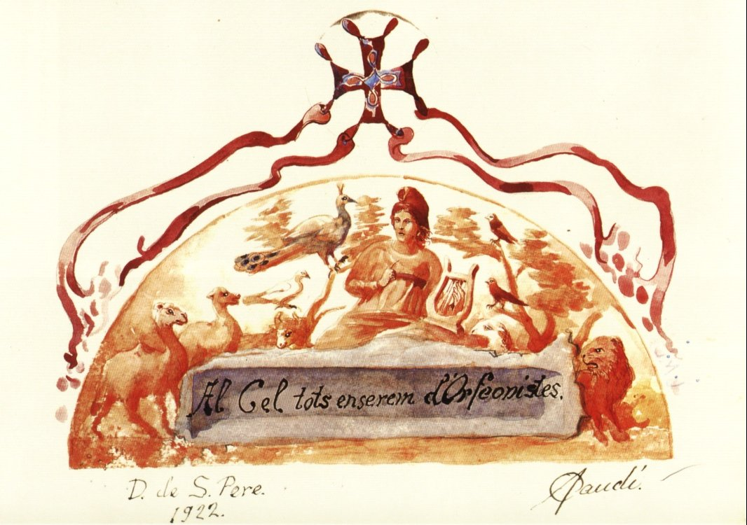 Dedicatoria al Orfeó Català, de Antoni Gaudí (1922)